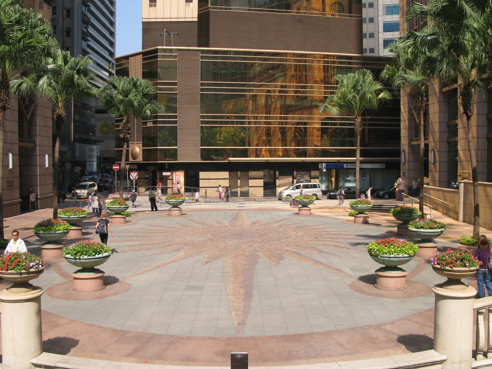 Millennium Plaza Open Space, Sheung Wan